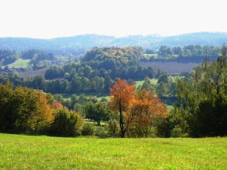 Typická krajina okolo Javorové skály a u obce Ounuz